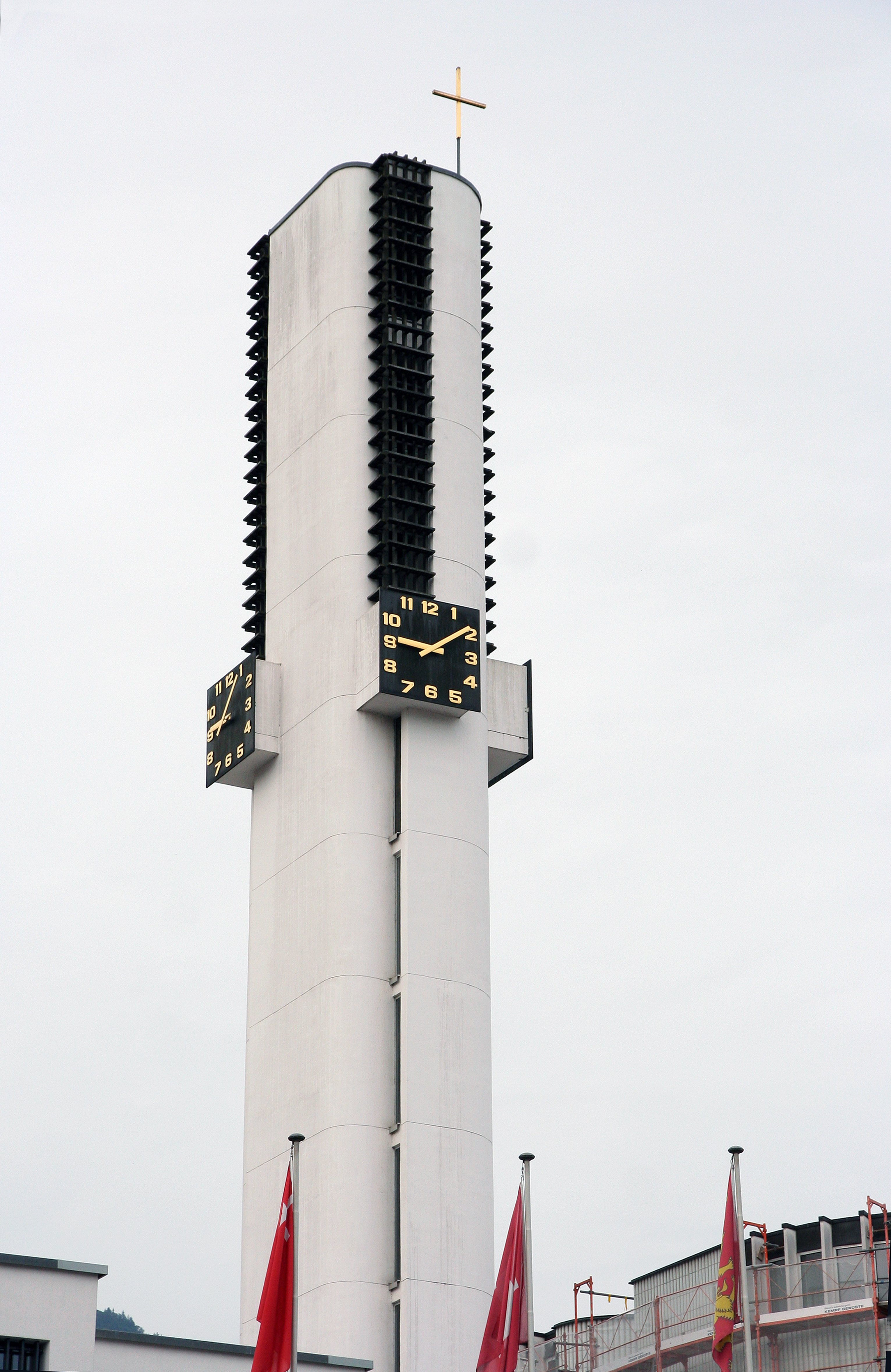 Römisch-katholische Kirche St. Meinrad Pfäffikon SZ, Turm